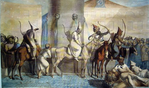 Французская акварель неизвестного автора называется «Башкиры в Париже». На глазах у изумленных парижан они поят в фонтане своих коней и демонстрируют свои луки.